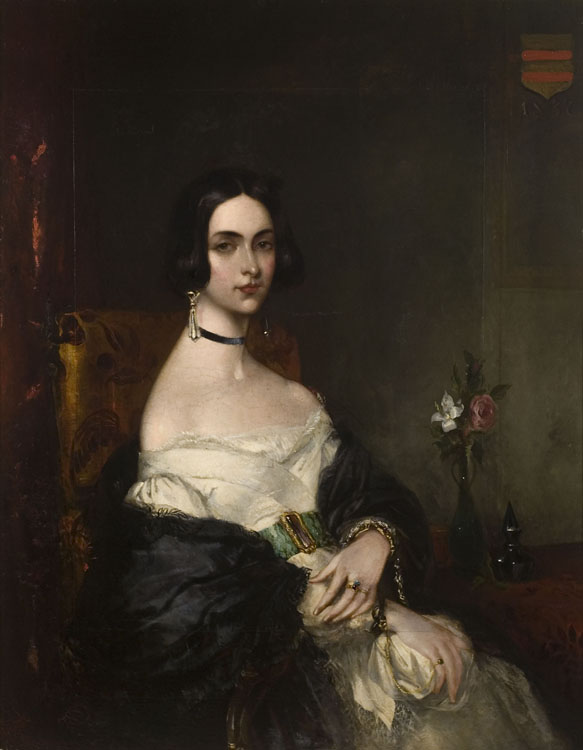 Theodor von Holst (?, 1810-1844). Half length portrait of a young lady seated in a chair beside a vase of flowers